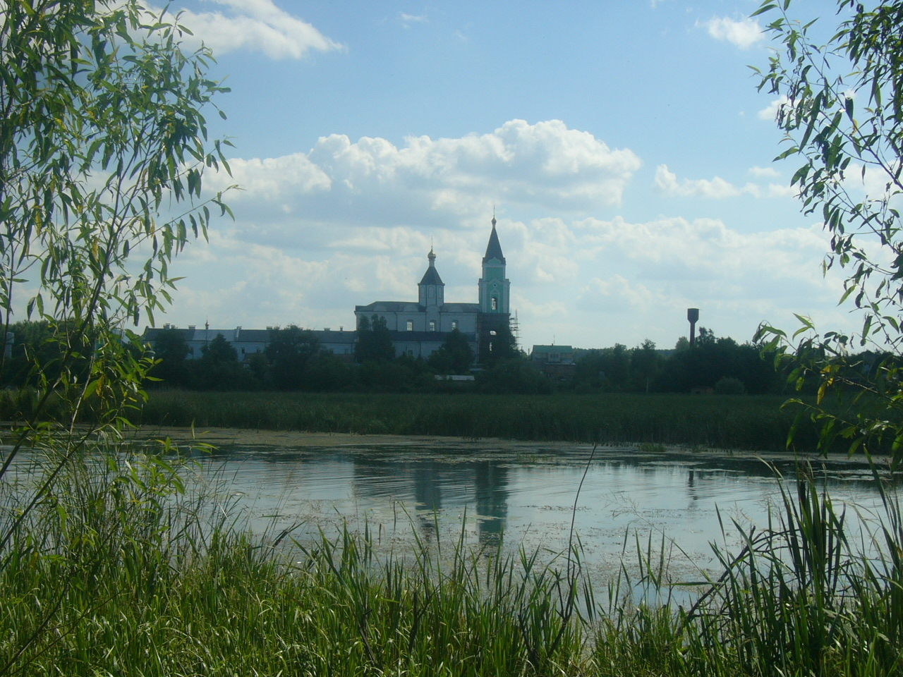 річка Рів у смт Браїлів Жмеринського району Вінницької області. на задньому плані - Браїлівський Свято-Троїцький жіночий монастир